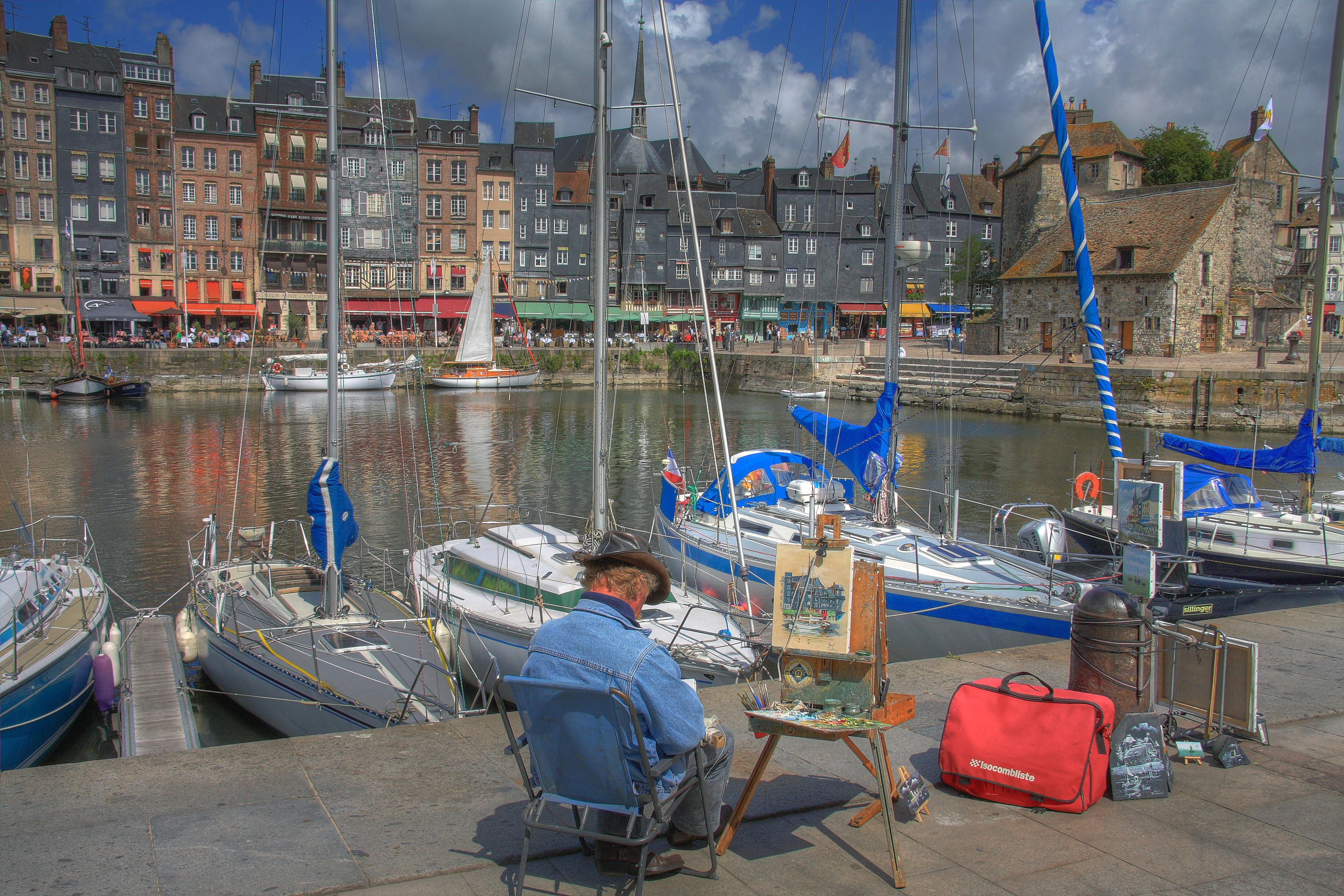 Un peintre sur le port de Honfleur. Note: l'image a subit des modifications sur ordinateur.